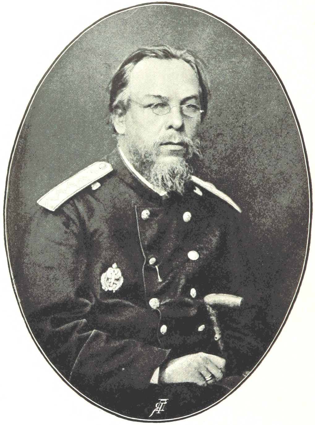 Сергей Петрович Боткин. Данное изображение было использовано в статье «Боткин, Сергей Петрович» опубликованной в пятом томе «Военной энциклопедии», который был издан книгоиздательским товариществом Ивана Дмитриевича Сытина в 1911 году в столице Российской империи городе Санкт-Петербурге.